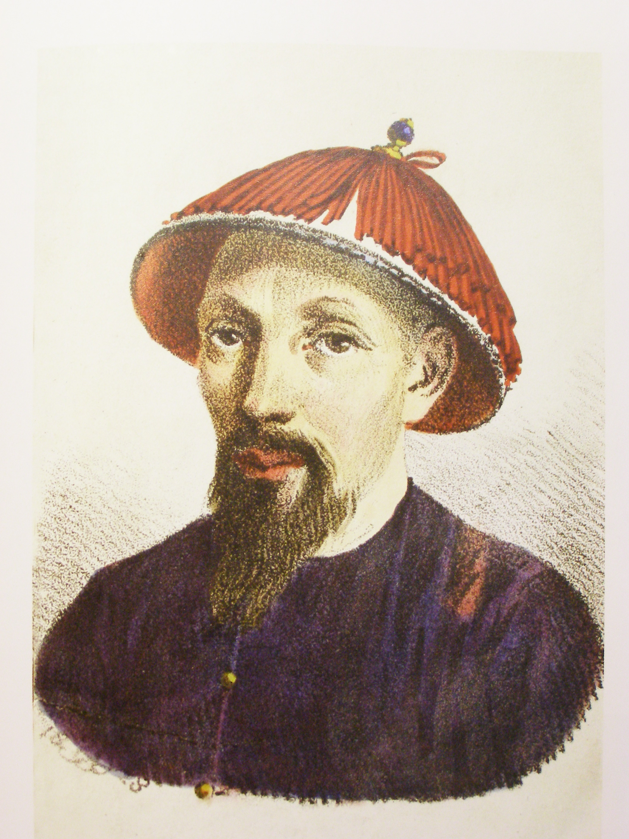 Портрет Н.Я. Бичурина в китайской одежде